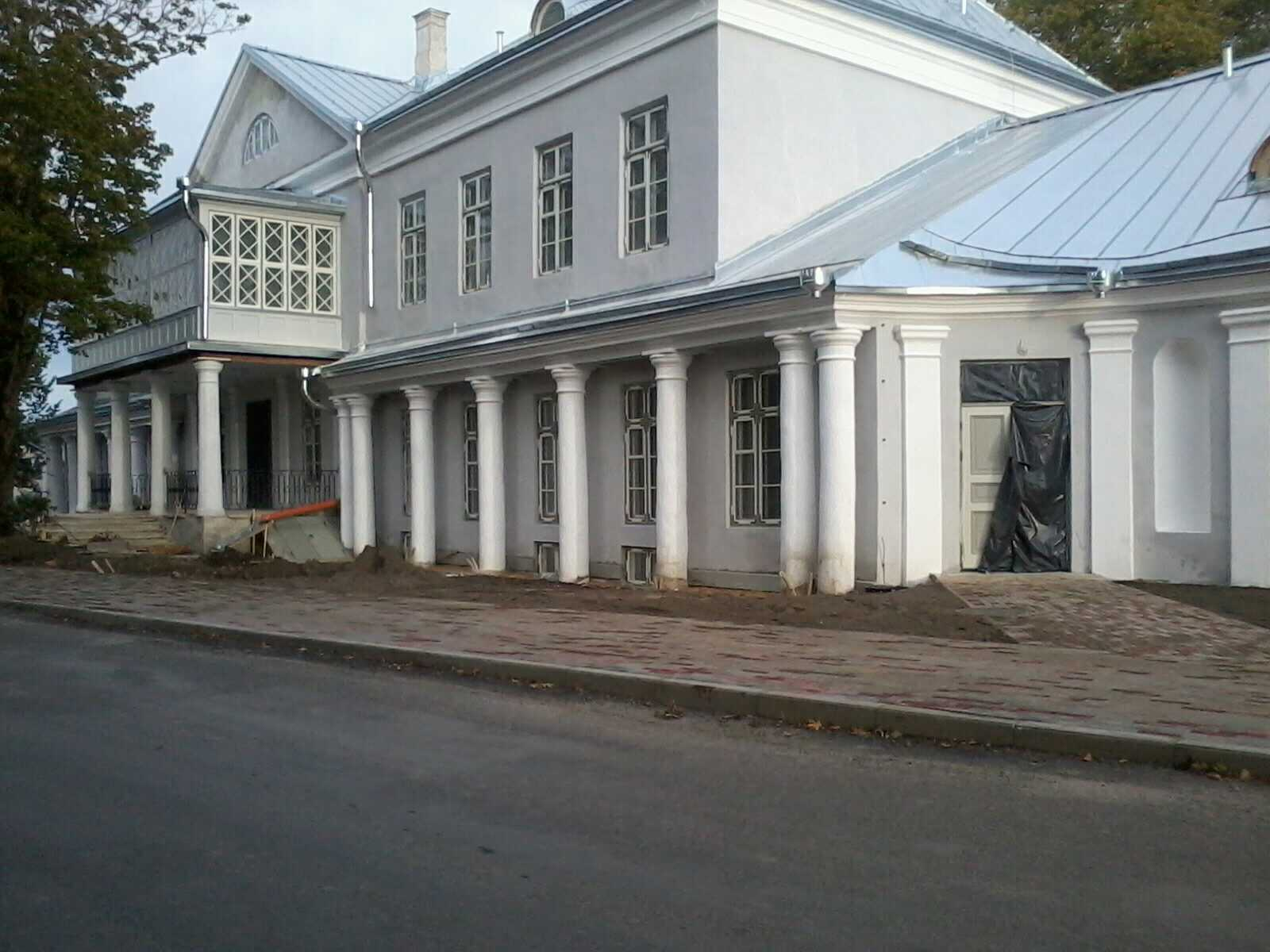 Aadlielamu Vaba tn.4